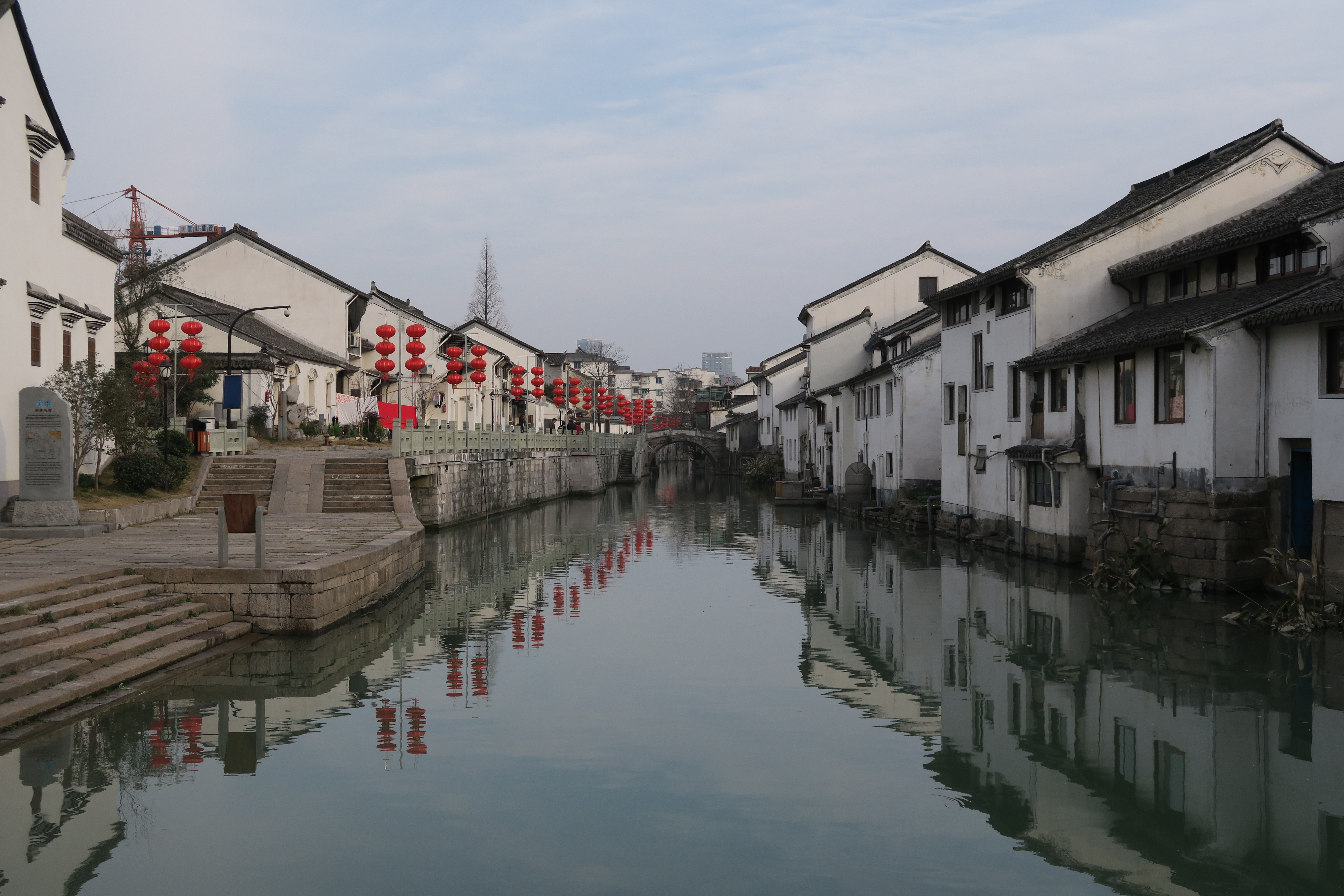 西兴古镇，2015-02-14